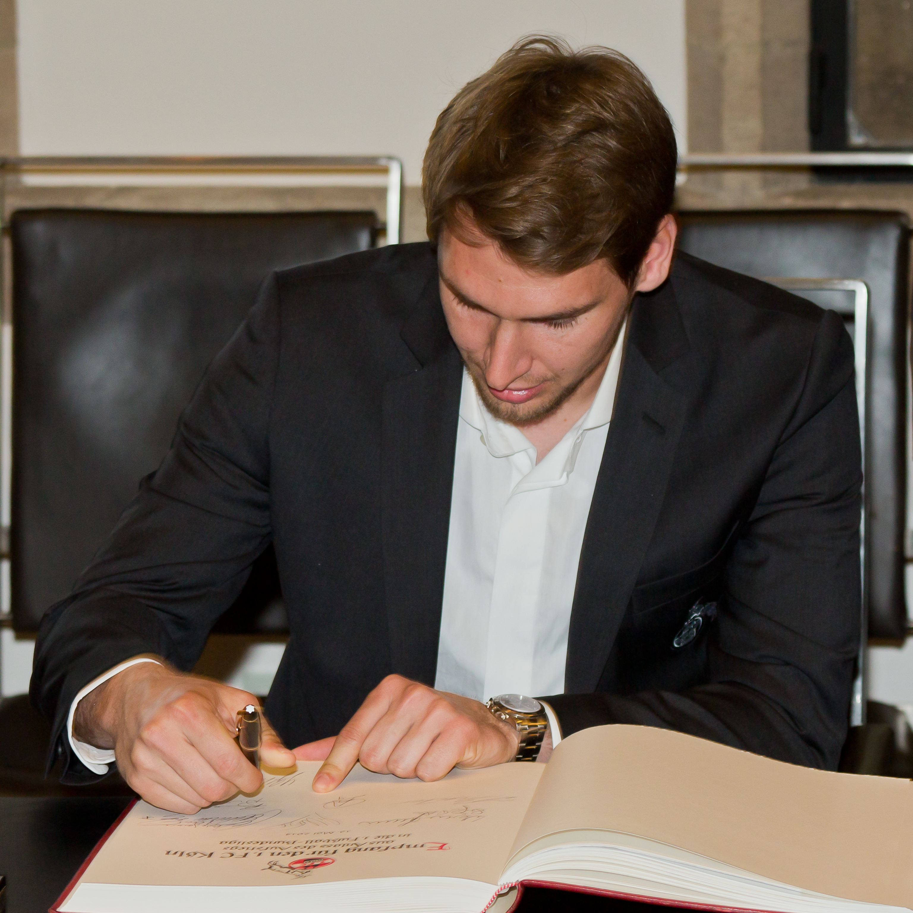 Empfang für den 1. FC Köln im RathausFoto: Patrick Helmes trägt sich in das Gästebuch der Stadt Köln ein